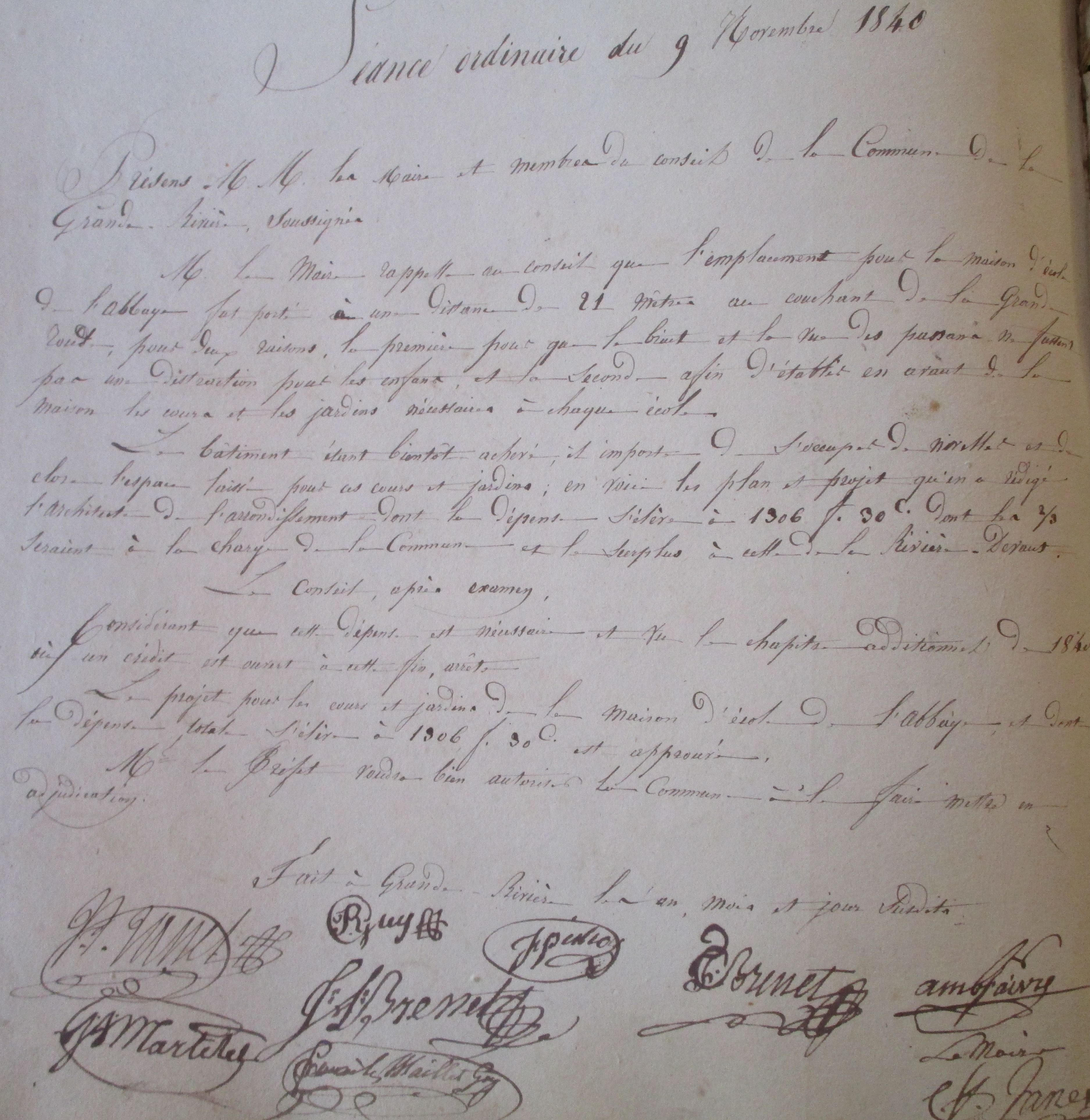 délibérations conseil municipal